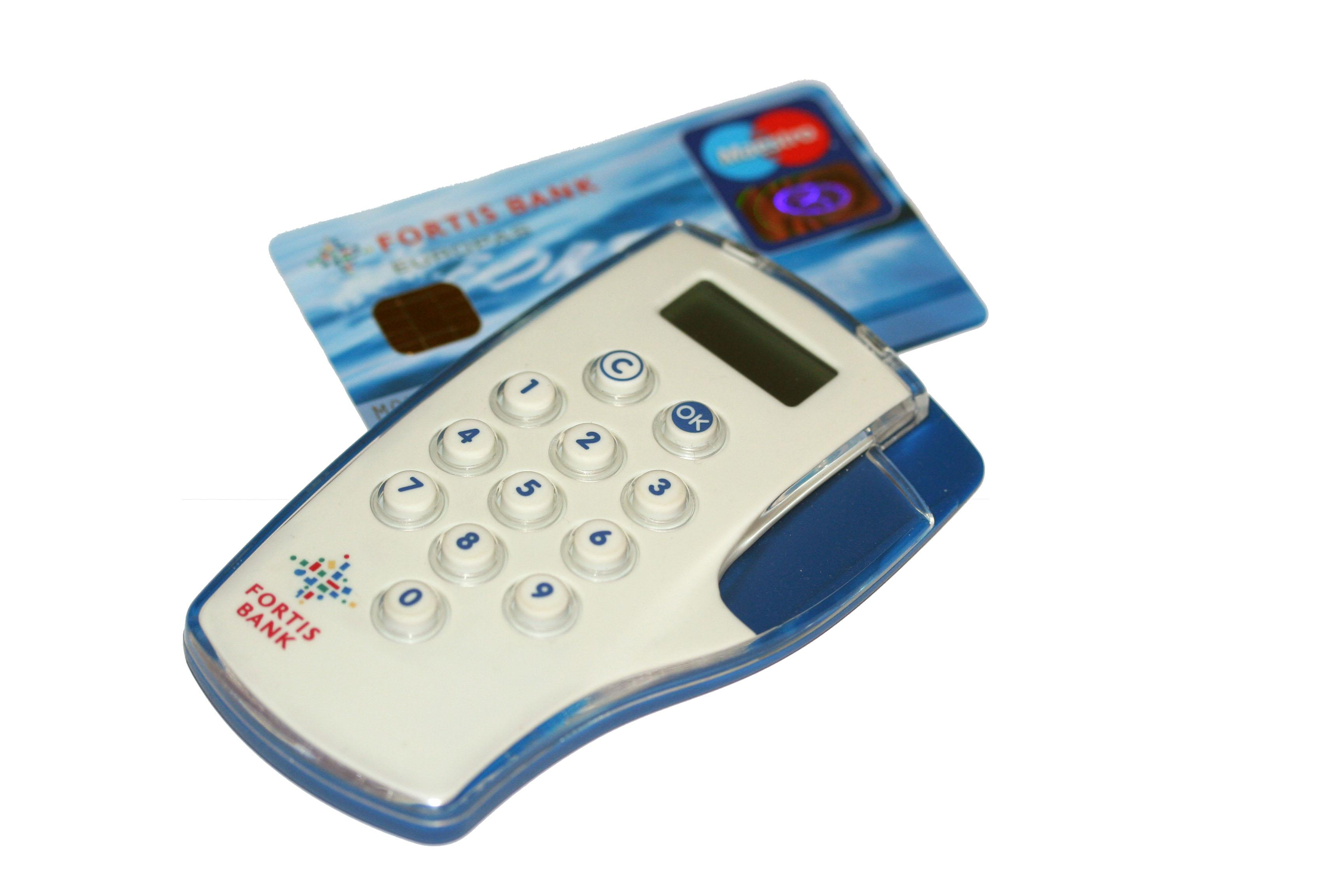 Internet_Banking